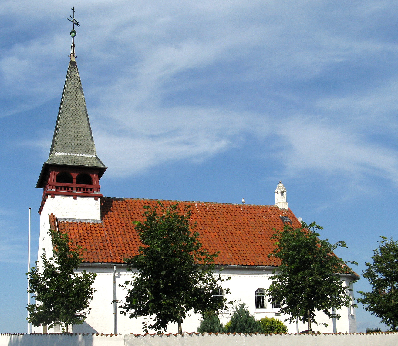 Reersø Kirke fra 1904